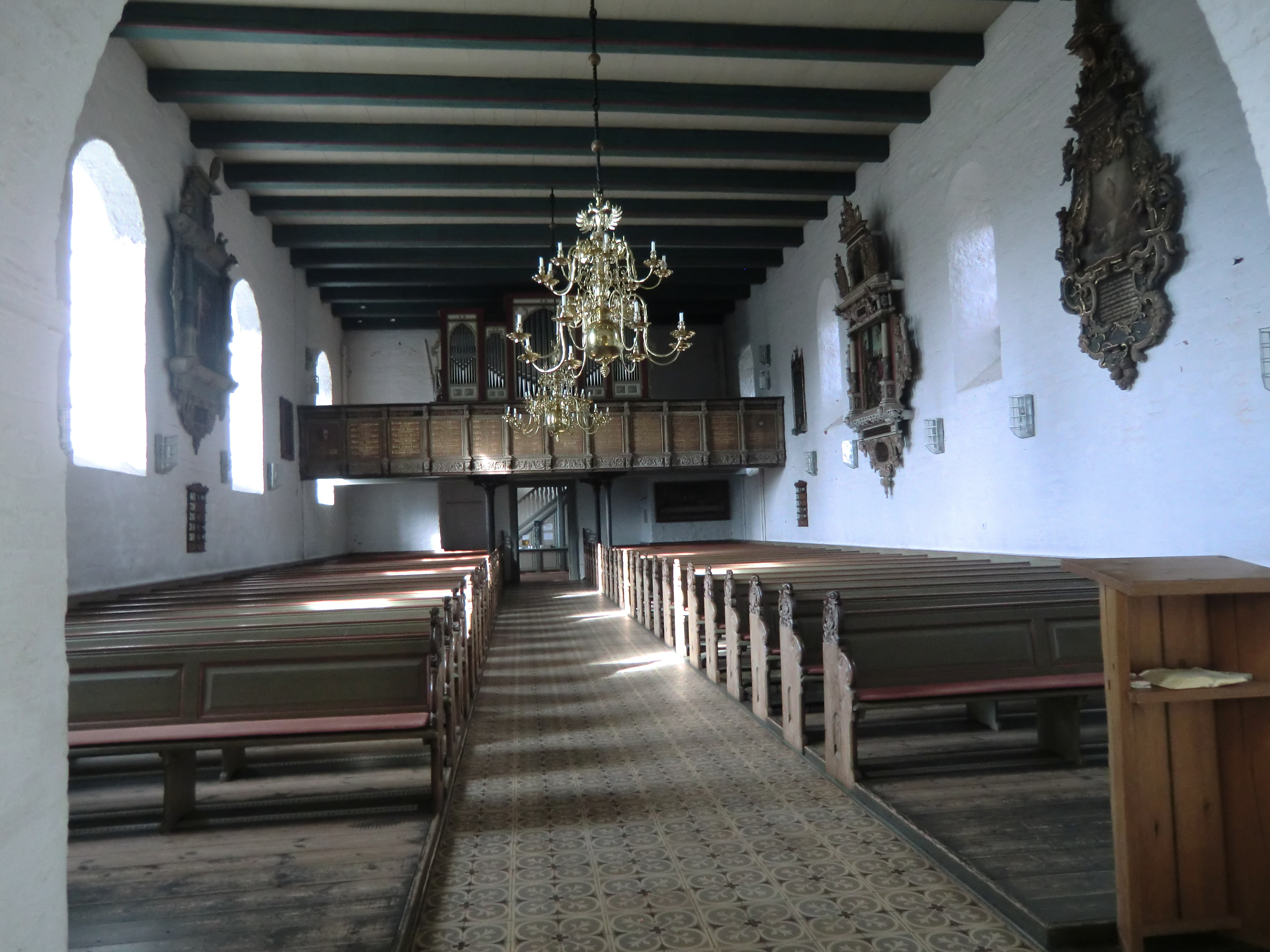 Kronleuchter